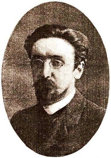 Русский экономист и политический деятель Сергей Николаевич Прокопович (1871-1955)